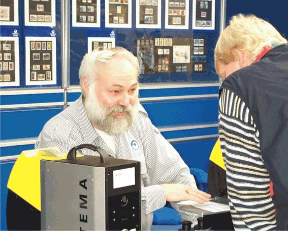 Angestellter des Postverk Føroya bei der Arbeit